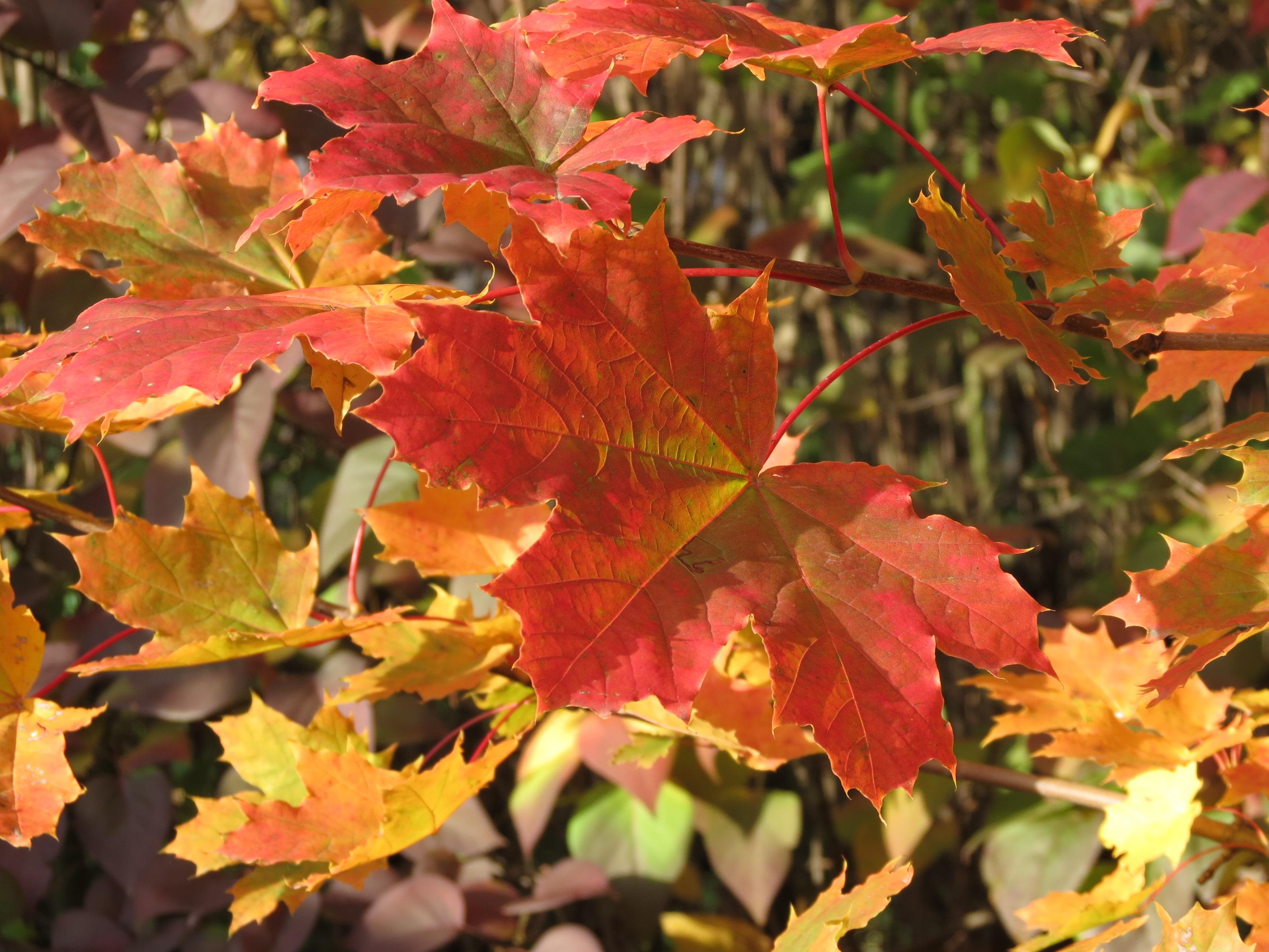 Herbstfärbung Spitzahorn in Mühlhausen-Pfafferode.